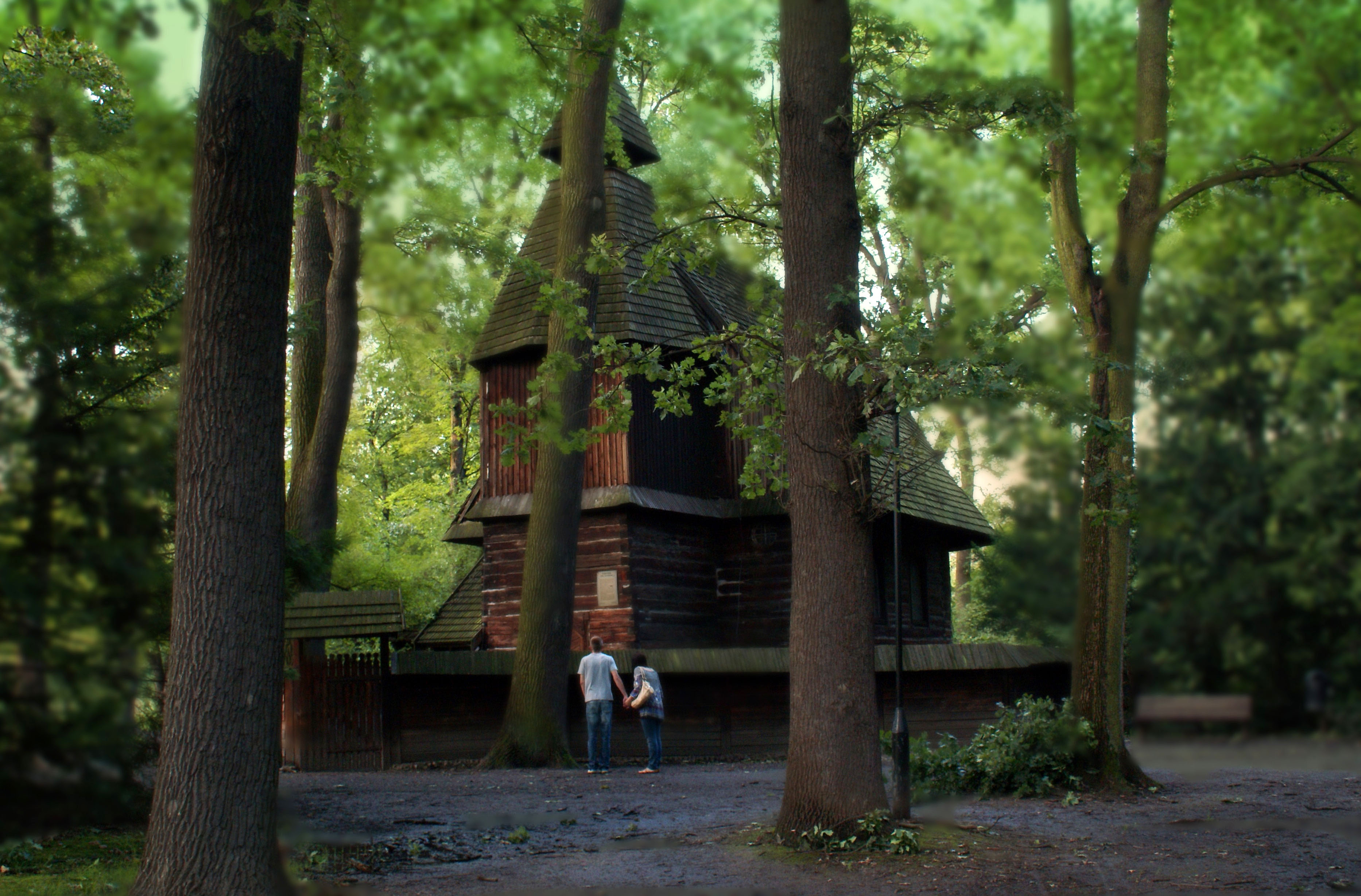 Kościół św. Jana Nepomucena Szczytnicki Park, al. Dąbska, Miasto Wrocław - Śródmieście